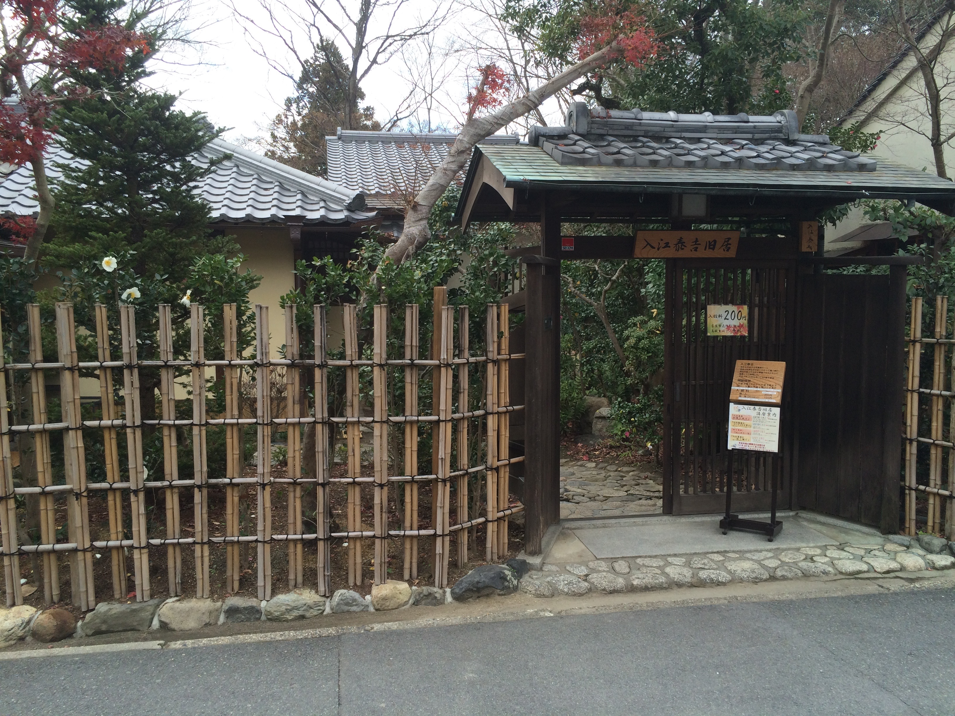 入江泰吉旧居入り口